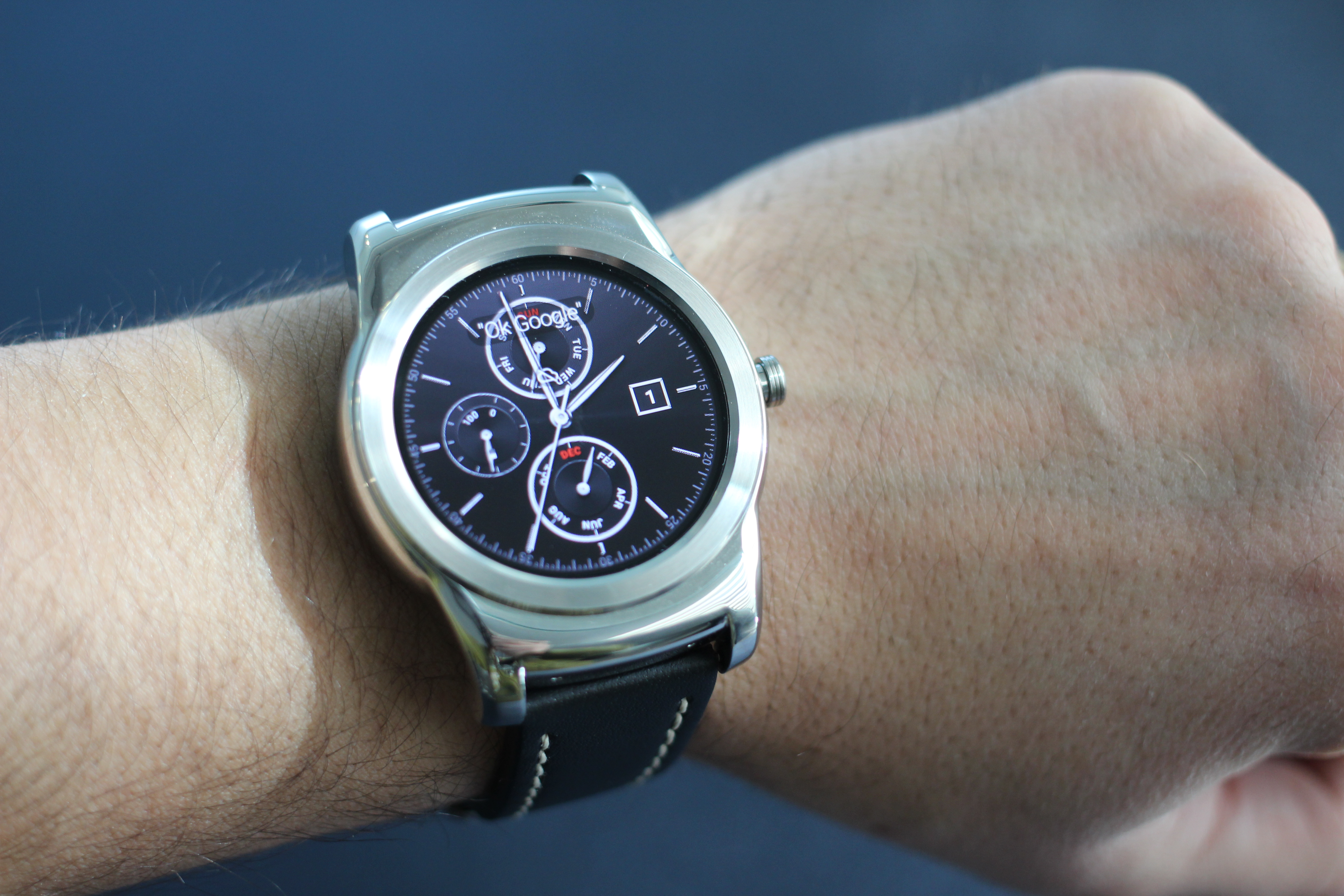 LG Watch Urbane